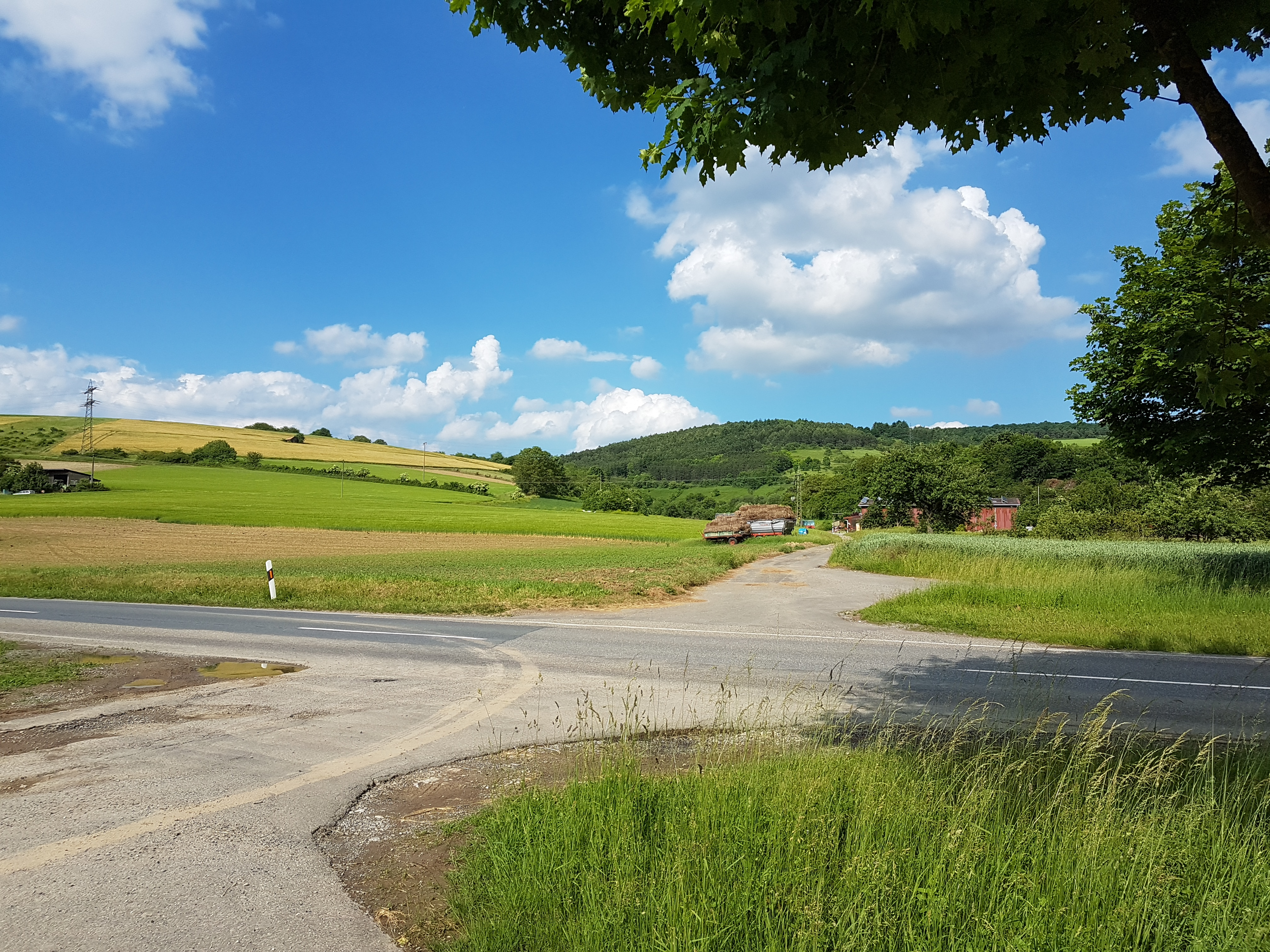 Blick über die L506 in den Fahrentalsgraben